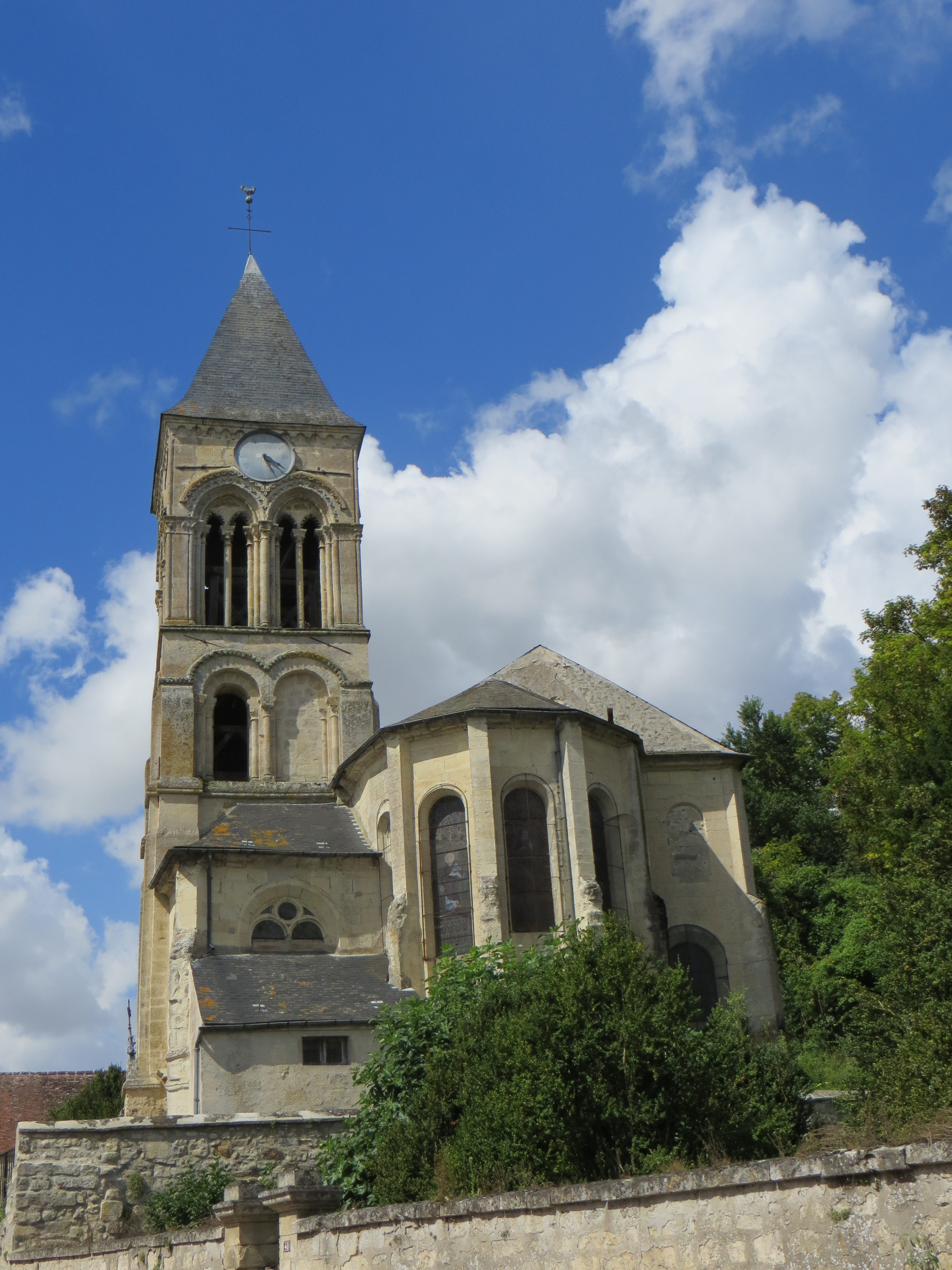 Vue générale de l'église